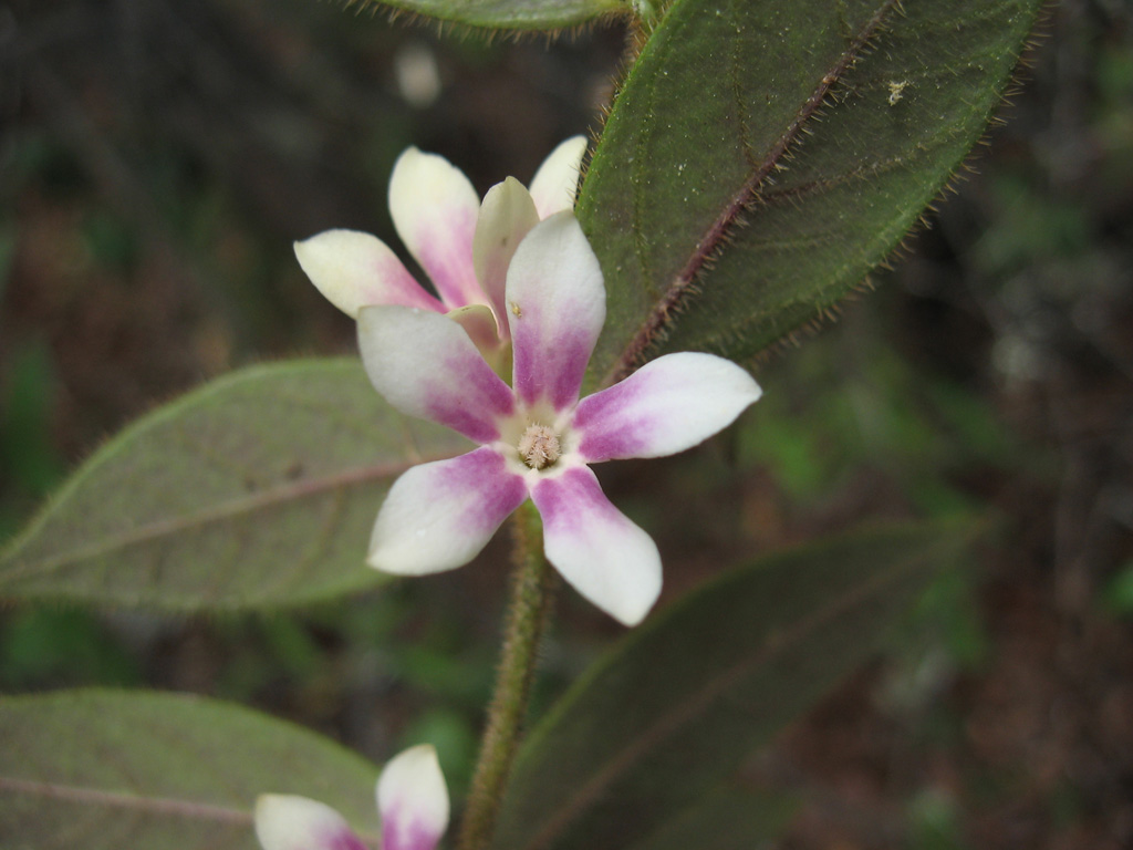 Voqui Quilmay (Elytropus chilensis), Poroto de Campo